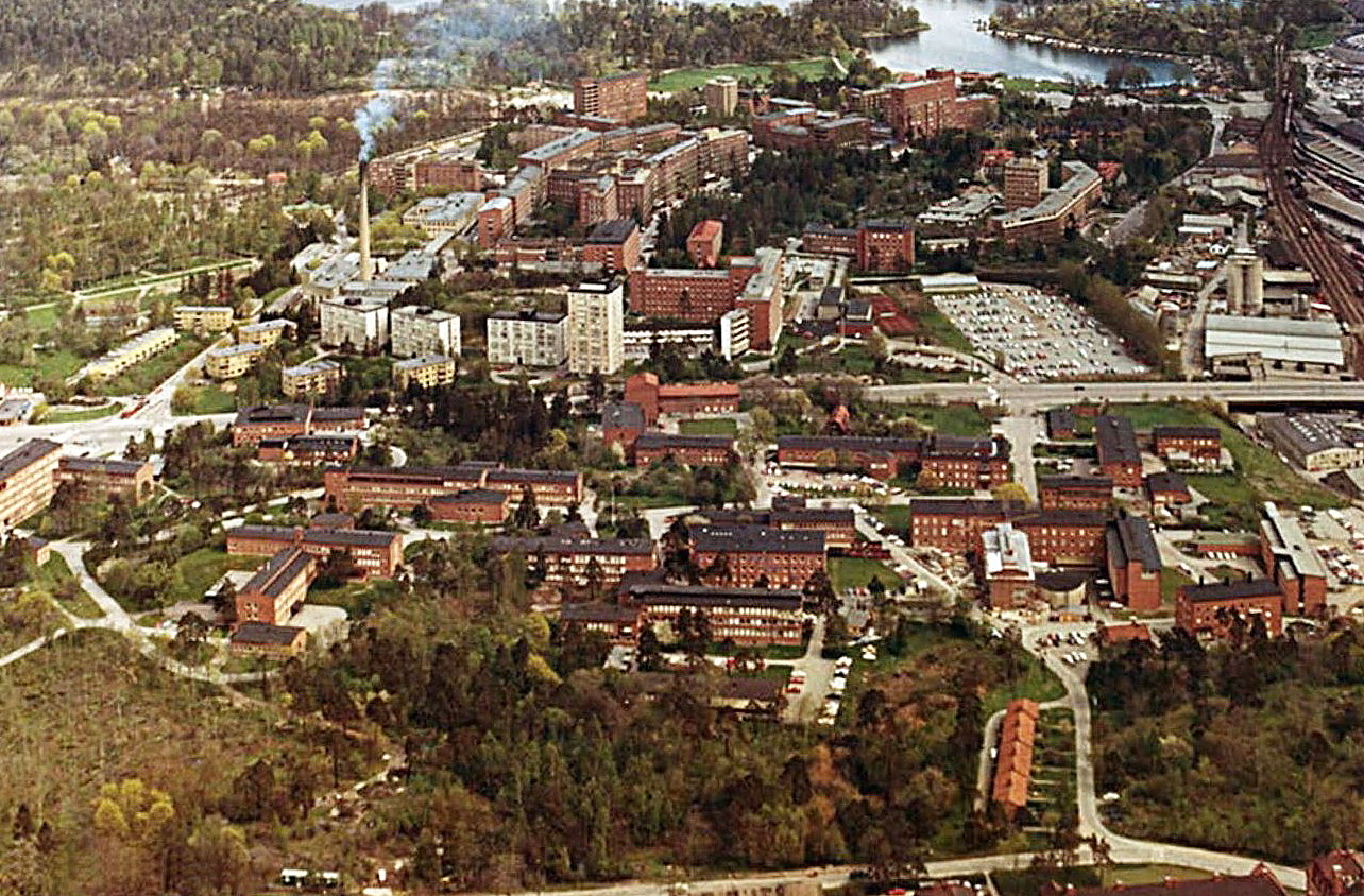 Flygbild över Campus Solna och Karolinska sjukhuset